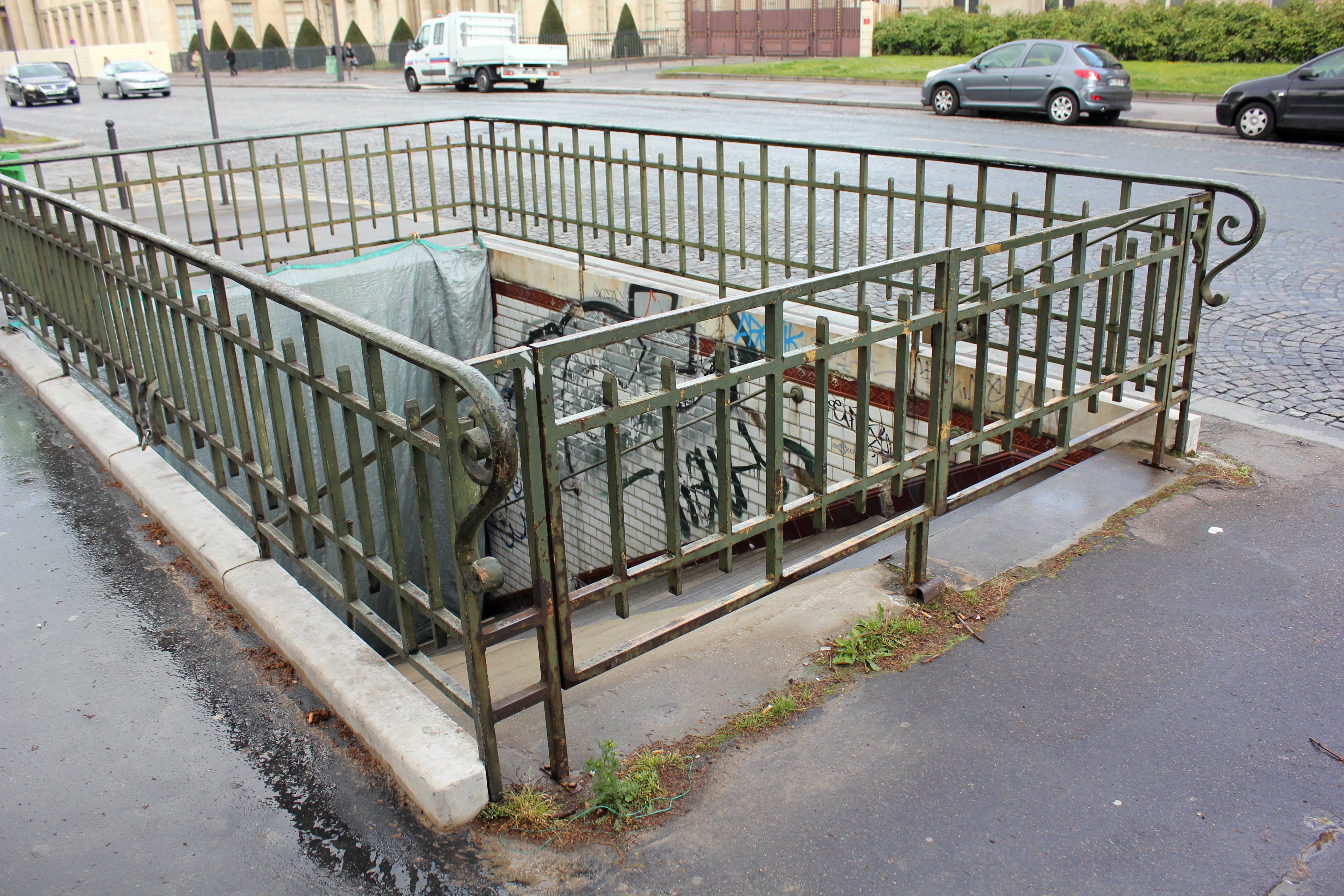 Paris Metro Linie 8 Champ de Mars Eingang.